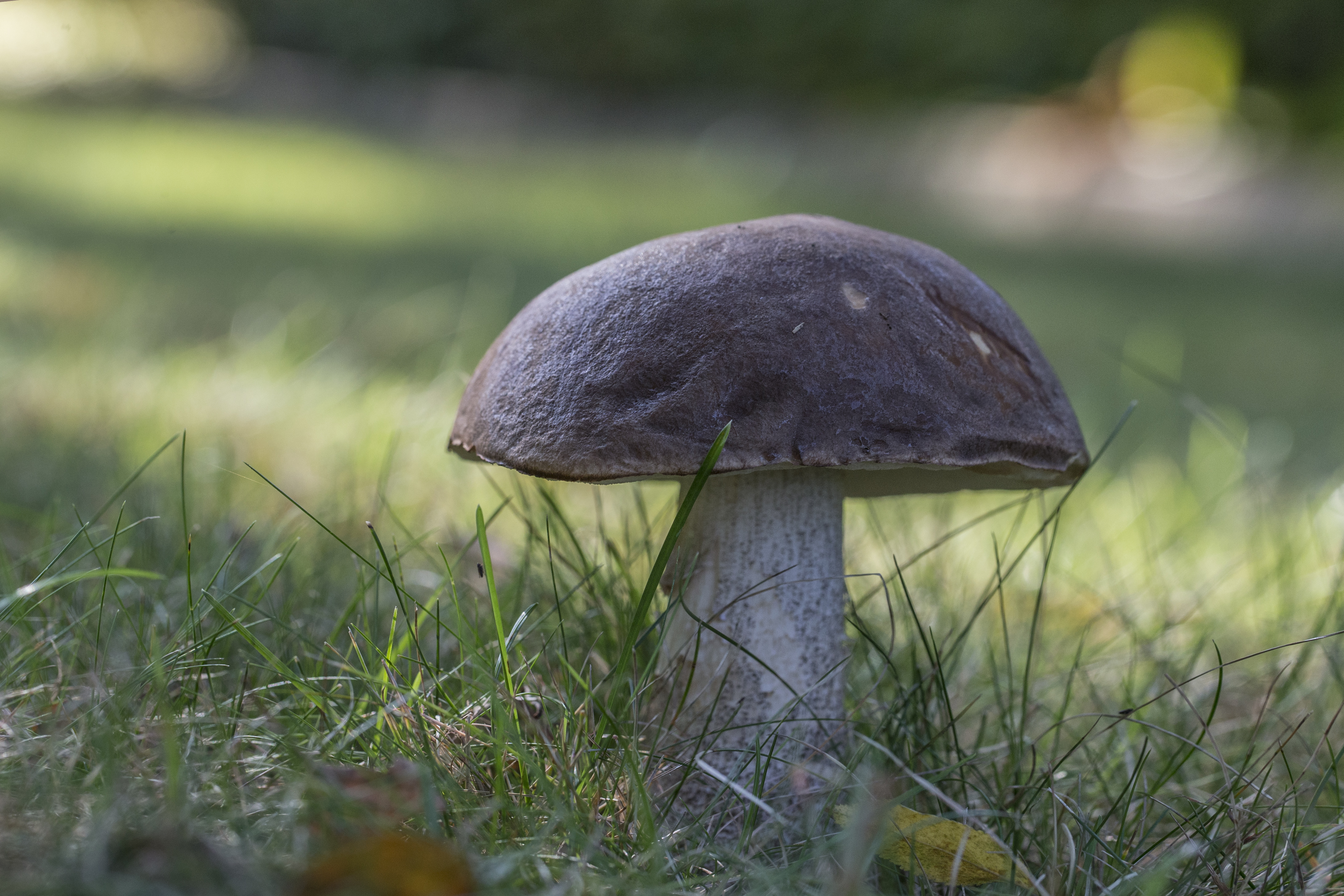 Leccinum scabrum Koźlarz babka, Łódź (Polska)